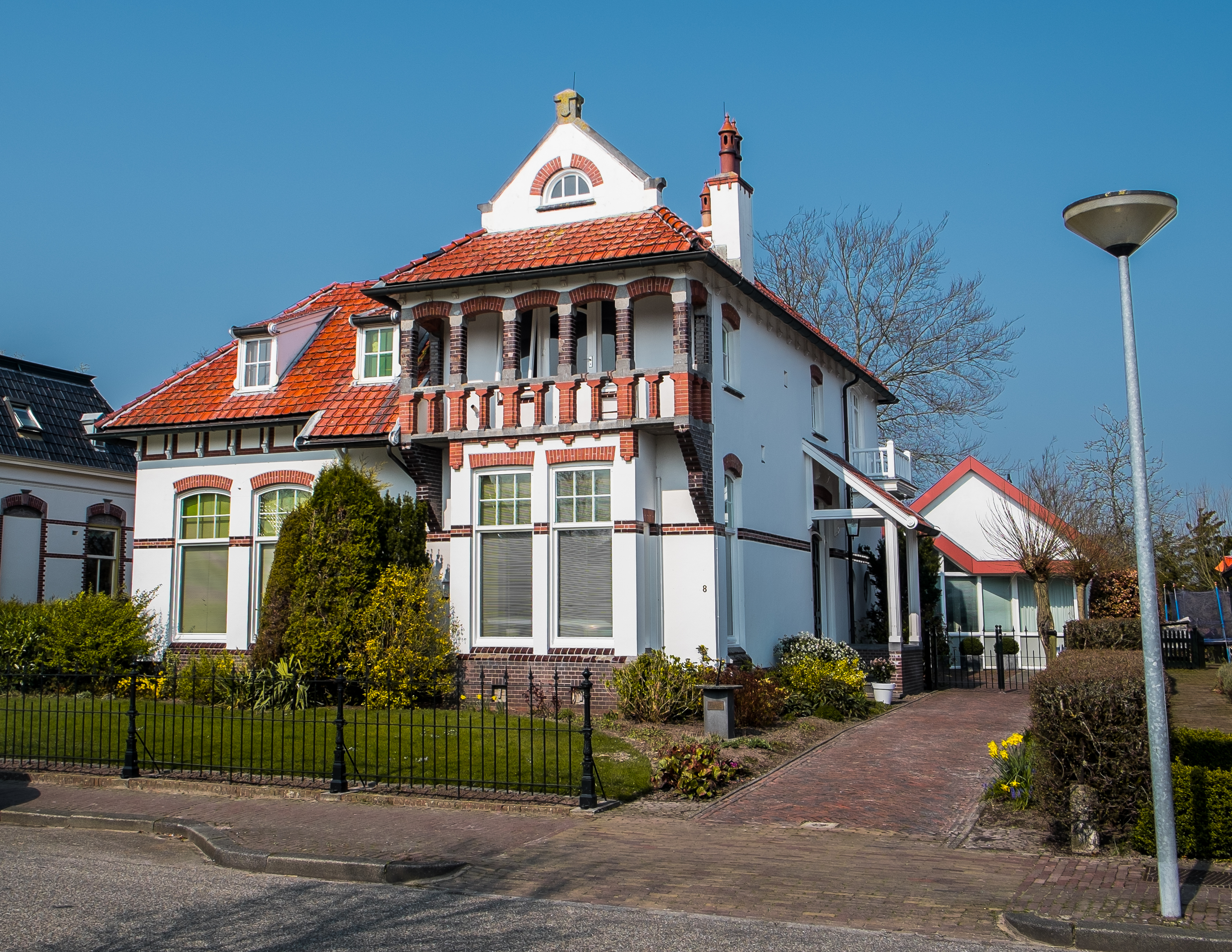 Herenhuis met praktijkruimte aan de Valge 8 in Leens. Gebouwd in 1902 naar ontwerp van Pieter Marinus Arnoldus Huurman